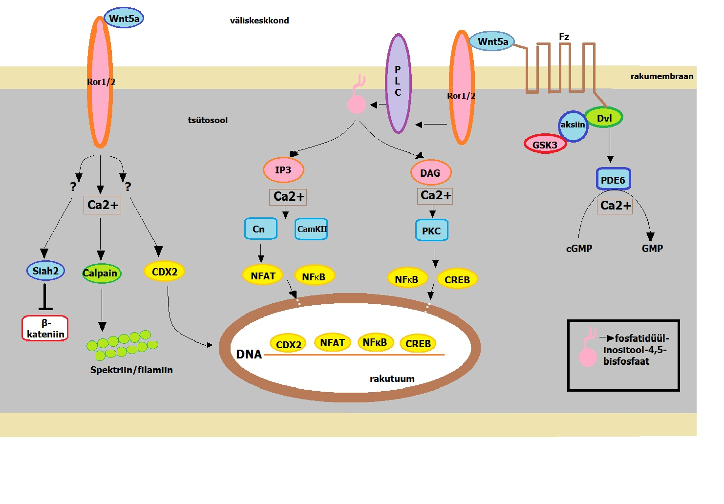 Mittekanooniline Wnt/Ca2+ rada.